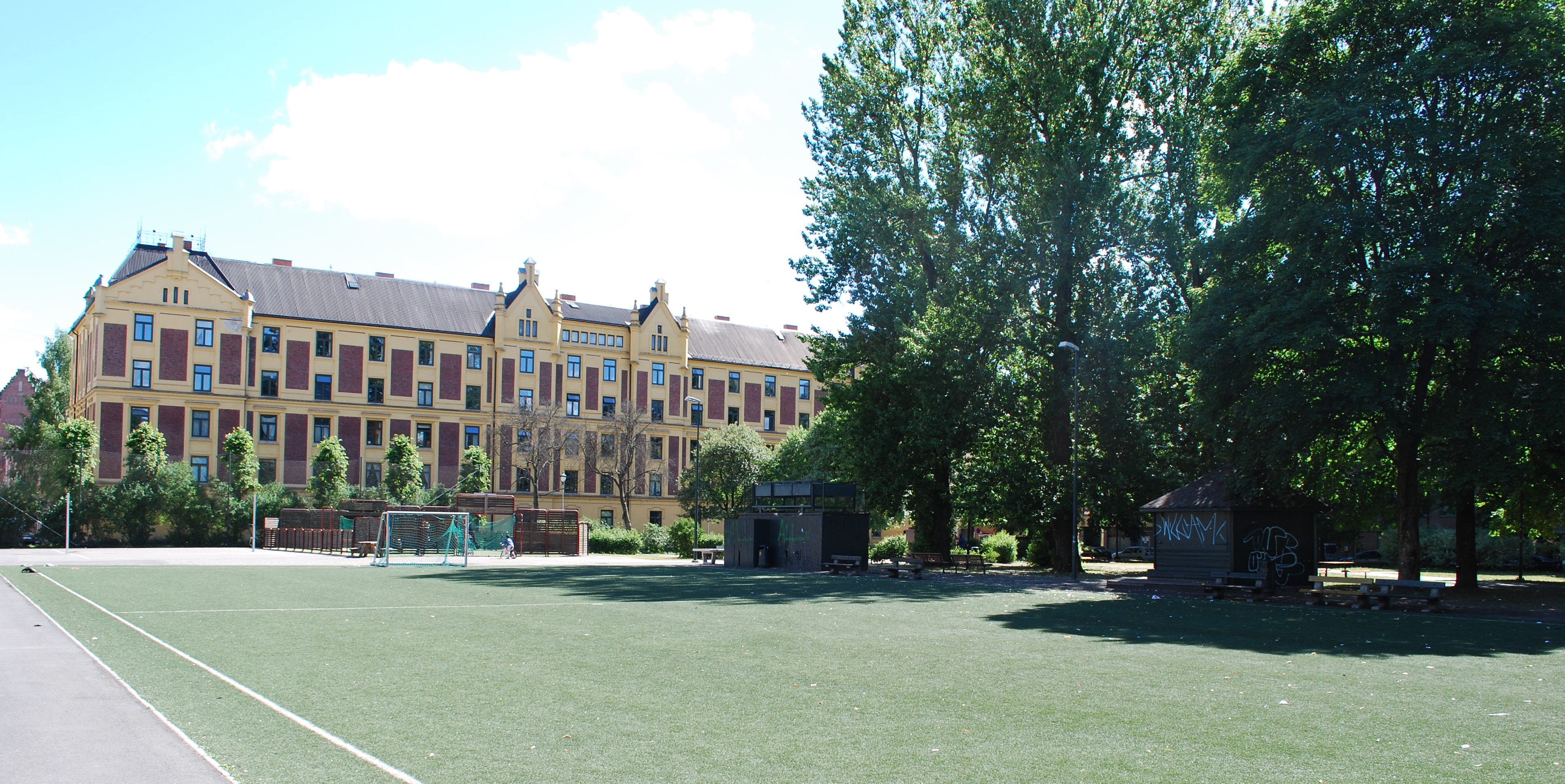 Rudolf Nilsens plass, Tøyen, Oslo, ballplassen